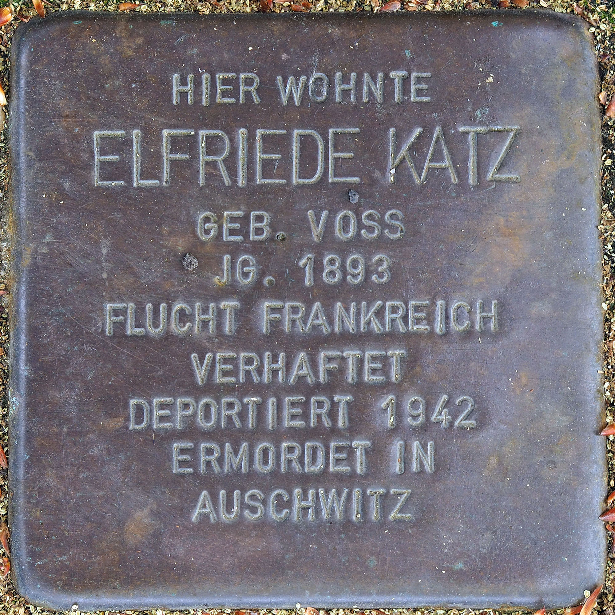 Stolpersteine GV: Katz, Elfriede